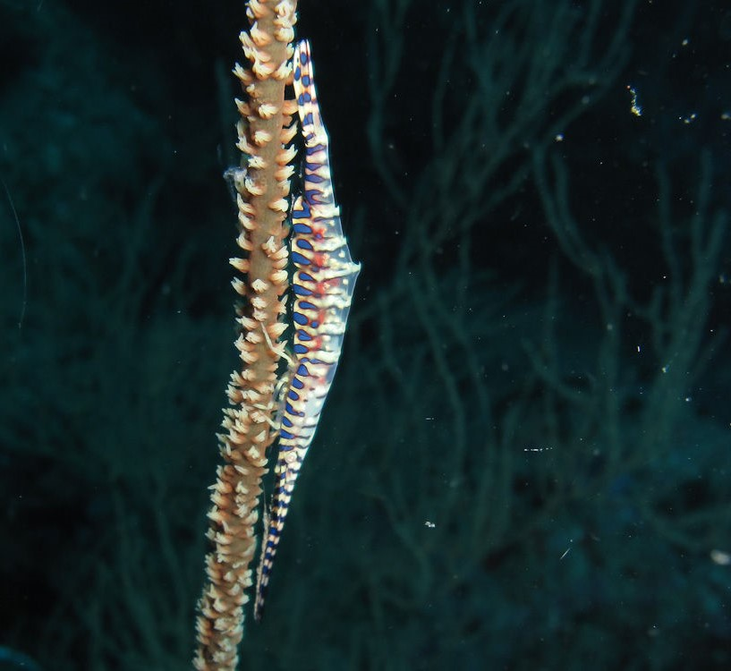 Tozeuma armatum, sobre colonia de coral negro Antipatharia sp, Koh Phangan, Tailandia